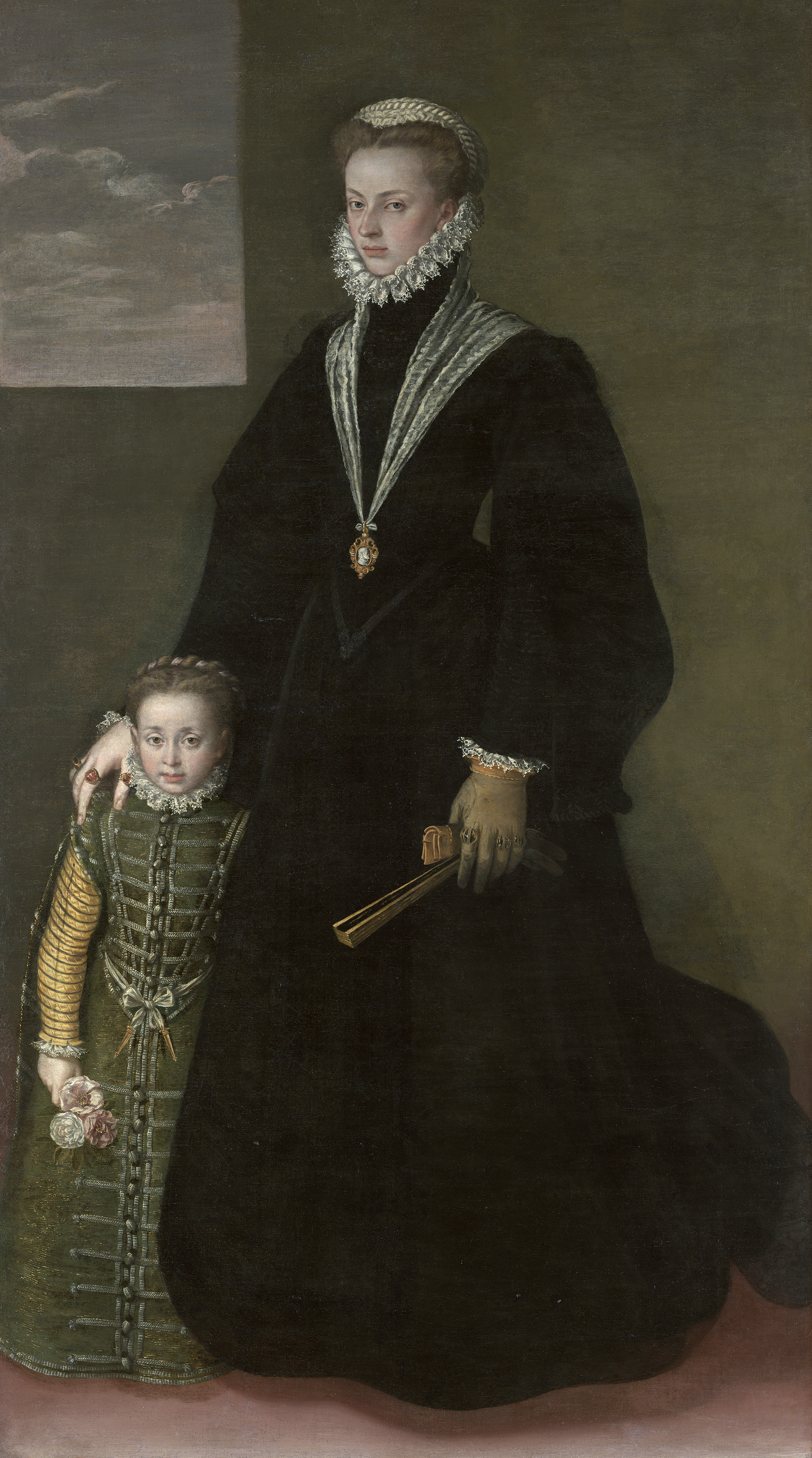 Retrato de Juana de Austria (1535-1573), que fue infanta de España y archiduquesa de Austria y era hija del emperador Carlos I de España y de la reina Isabel de Portugal y también hermana del rey Felipe II de España.